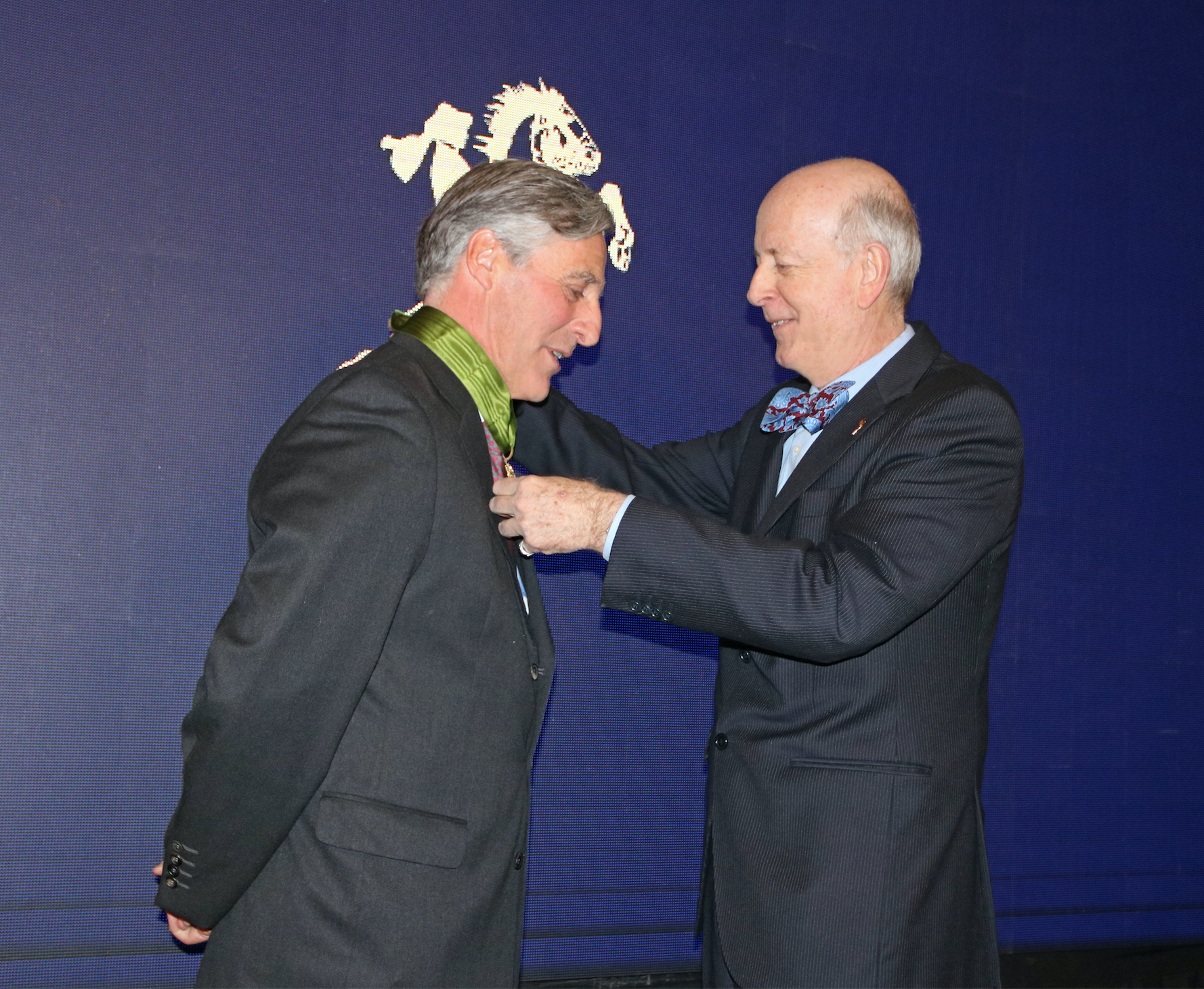 El Rey de España condecora a través del Embajador de España en Chile, Carlos Robles Fraga a Felipe Ibáñez.